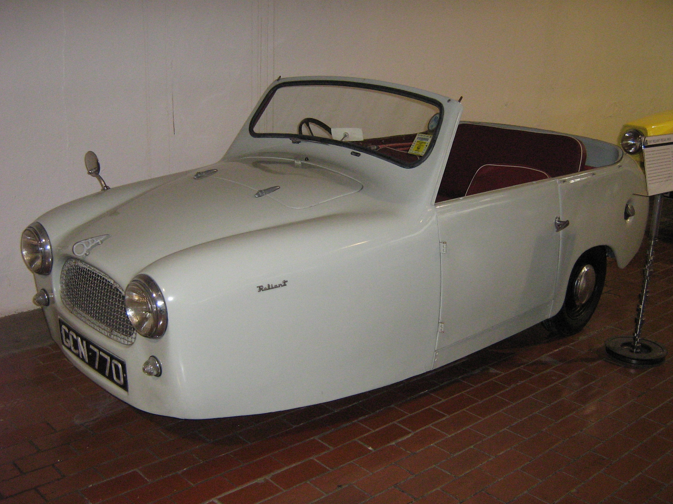 1957 Reliant Regal MkIII